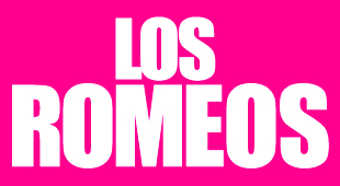 Los Romeos